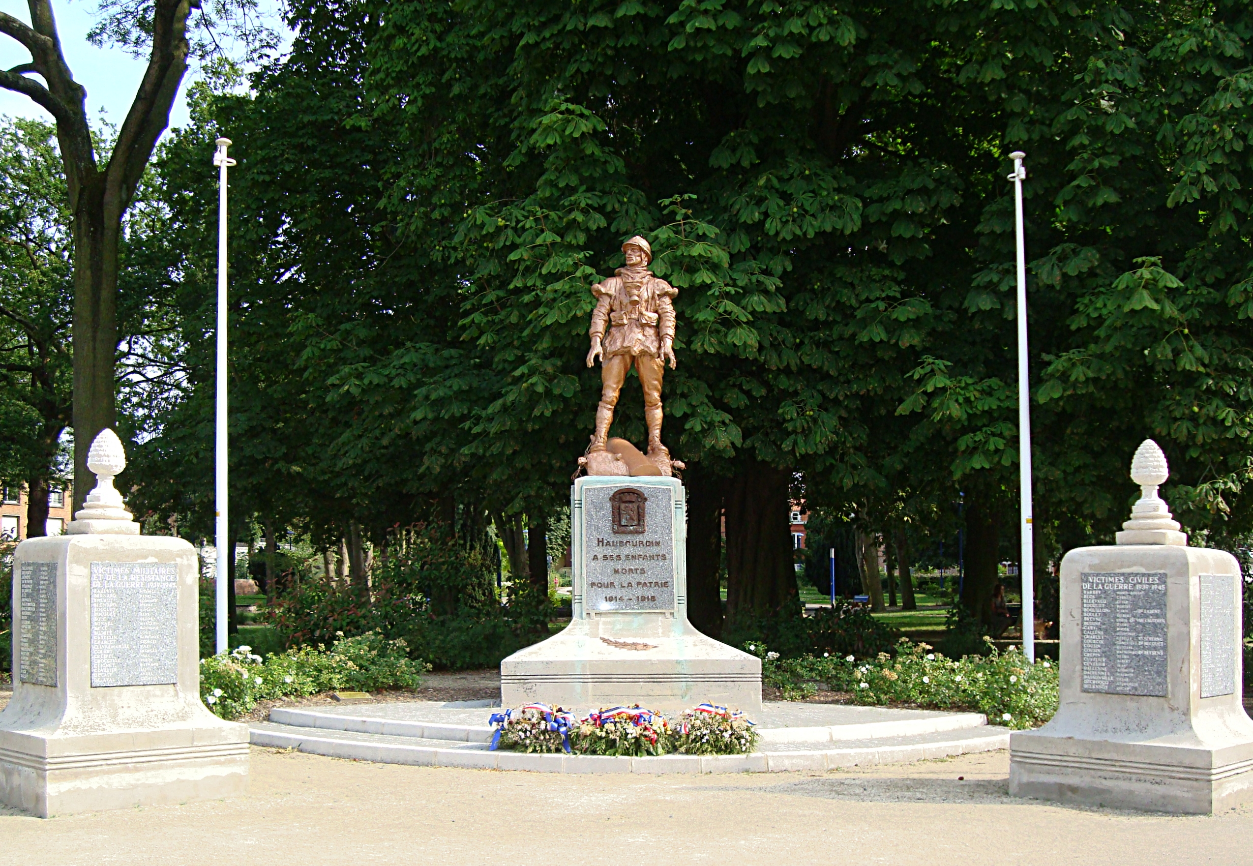 Monument aux morts de Haubourdin (Nord).